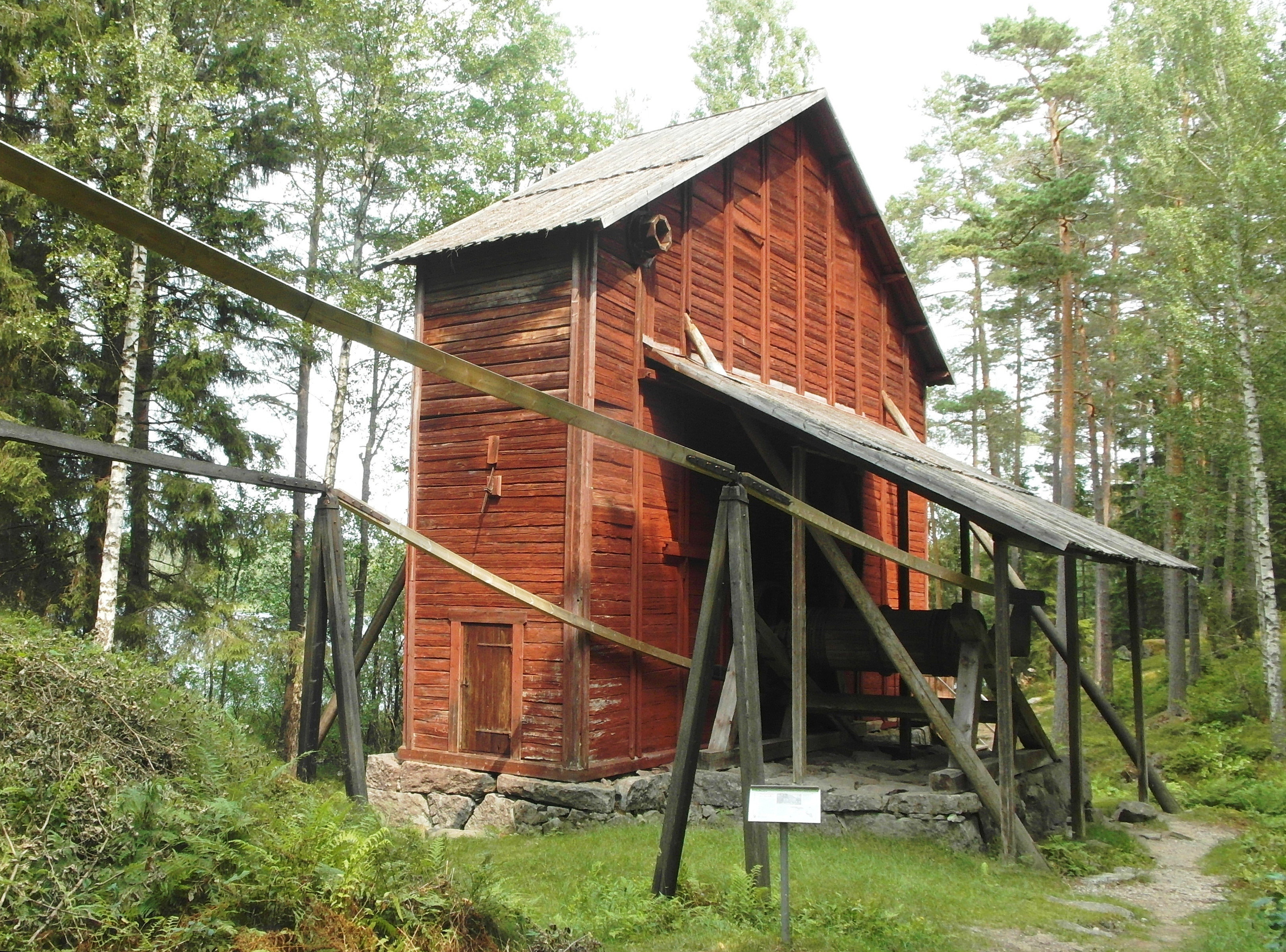 Vattenhjulet Bredsjönäskonsten, Åker, Södermanland, juli 2013